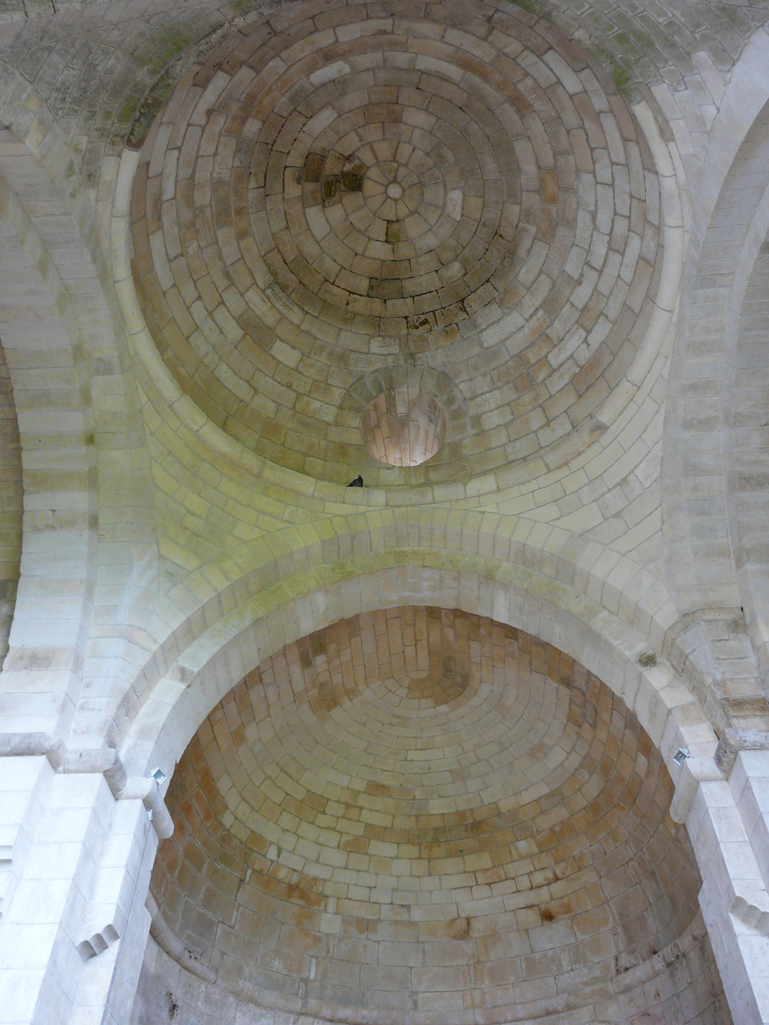 Une coupole et l'abside en cul de four, ruines de l'abbaye de Boschaud, Villars, Dordogne, France